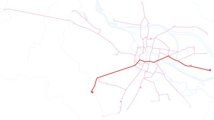 Poglądowa mapka przebiegu linii tramwajowej 4 we Wrocławiu.